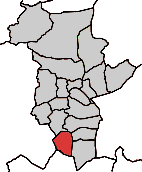 Situación da parroquia de Moncelos no concello de Abadín